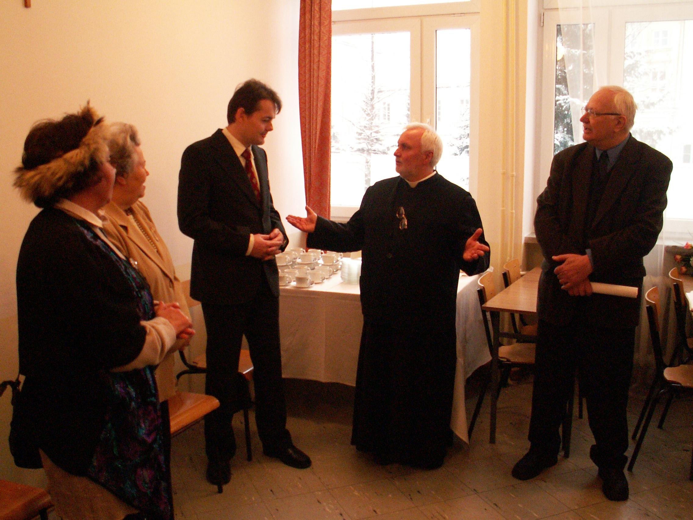 D. Ostapiuk, D. Narzyńska, L. Jańczuk, J. Banak, E. Czajko